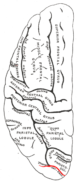 trans occipital sulcus.